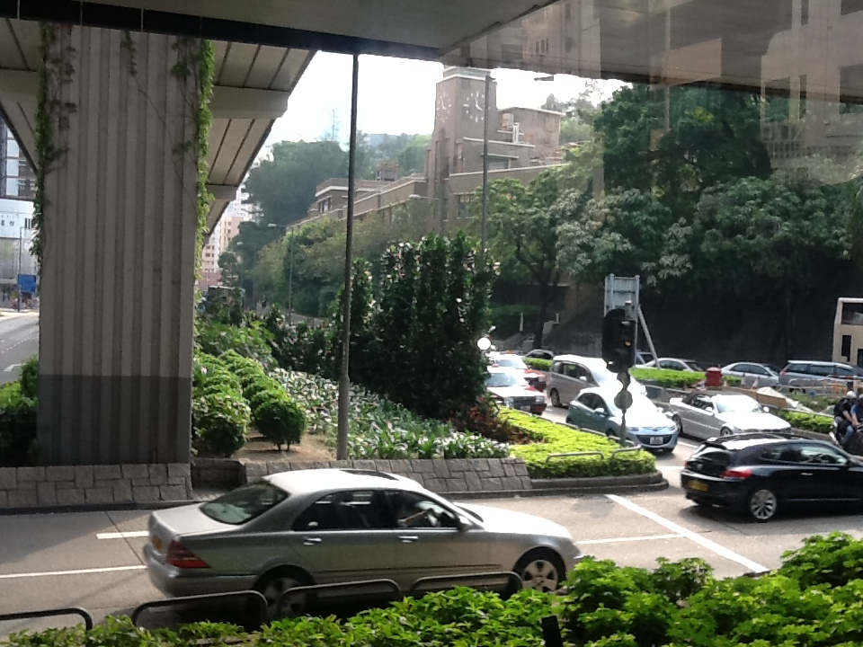 粵語: 亞皆老街近中華電力總部